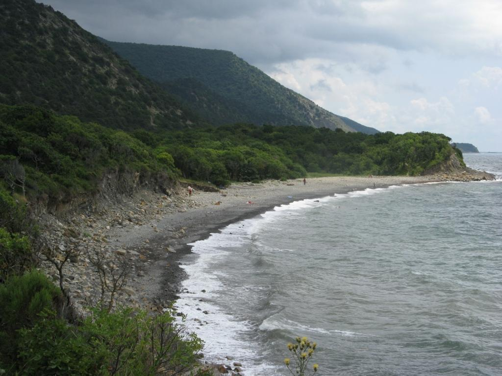 Вид на берег и горы, покрытые можжевельником, на 2-3 лагуне Утришского заказника